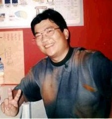 Butt Wah Lau, Author, Hong Kong 香港作家畢華流